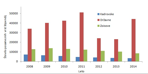 vir: surs